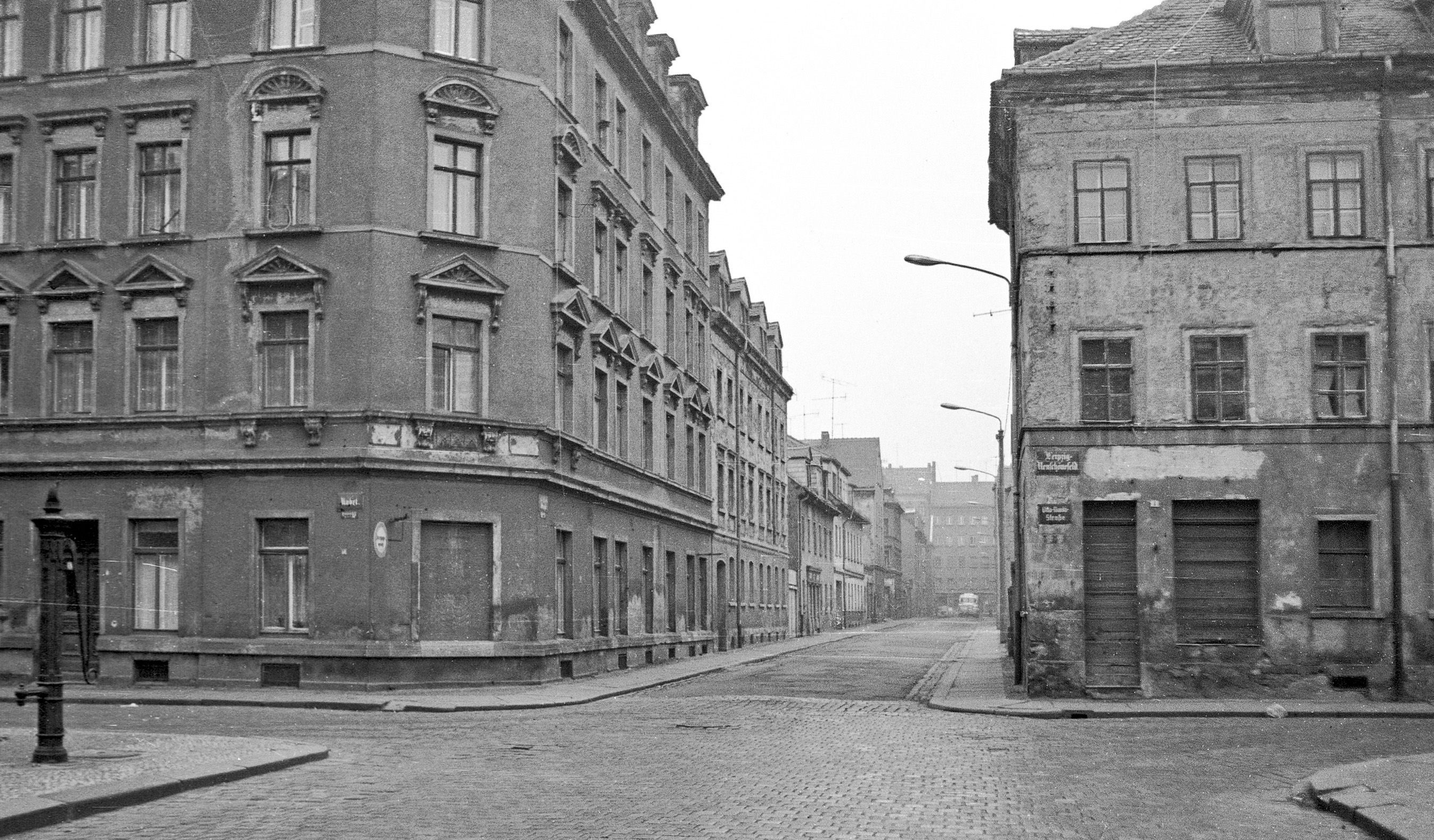 Blick in die Melchiorstraße in Leipzig-Neuschönefeld 1975 vor dem großflächigen Abriss für einen Freizeitpark